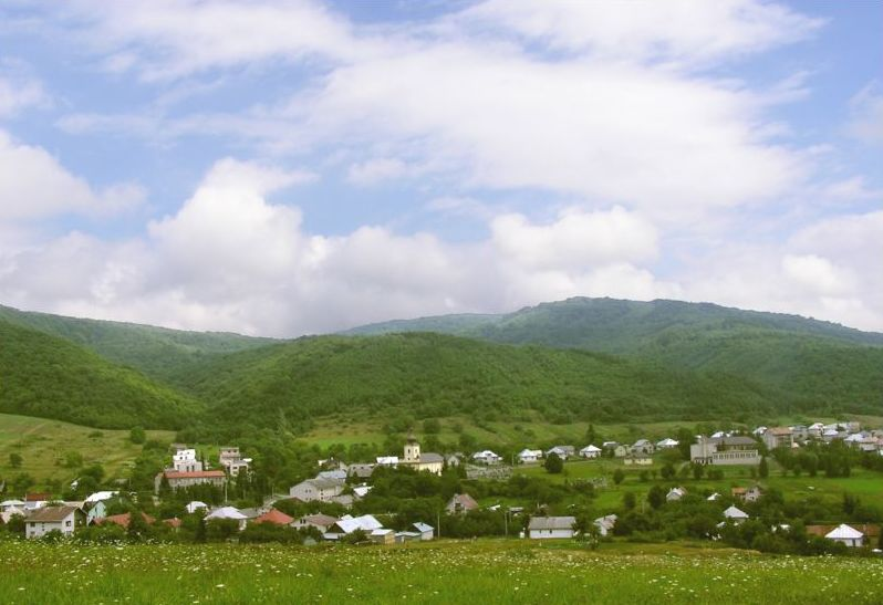 Celkový pohľad na Cerninu